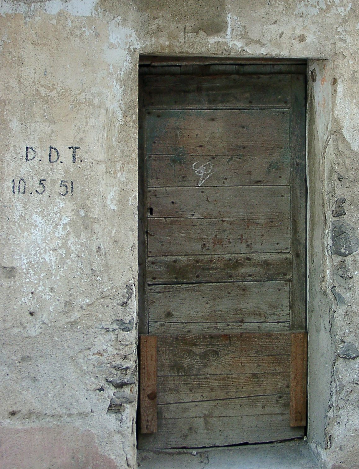 Tür mit Markierung, dass DDT gegen Malaria versprüht wurde; Orosei, Provinz Nuoro, Sardinien, Italien